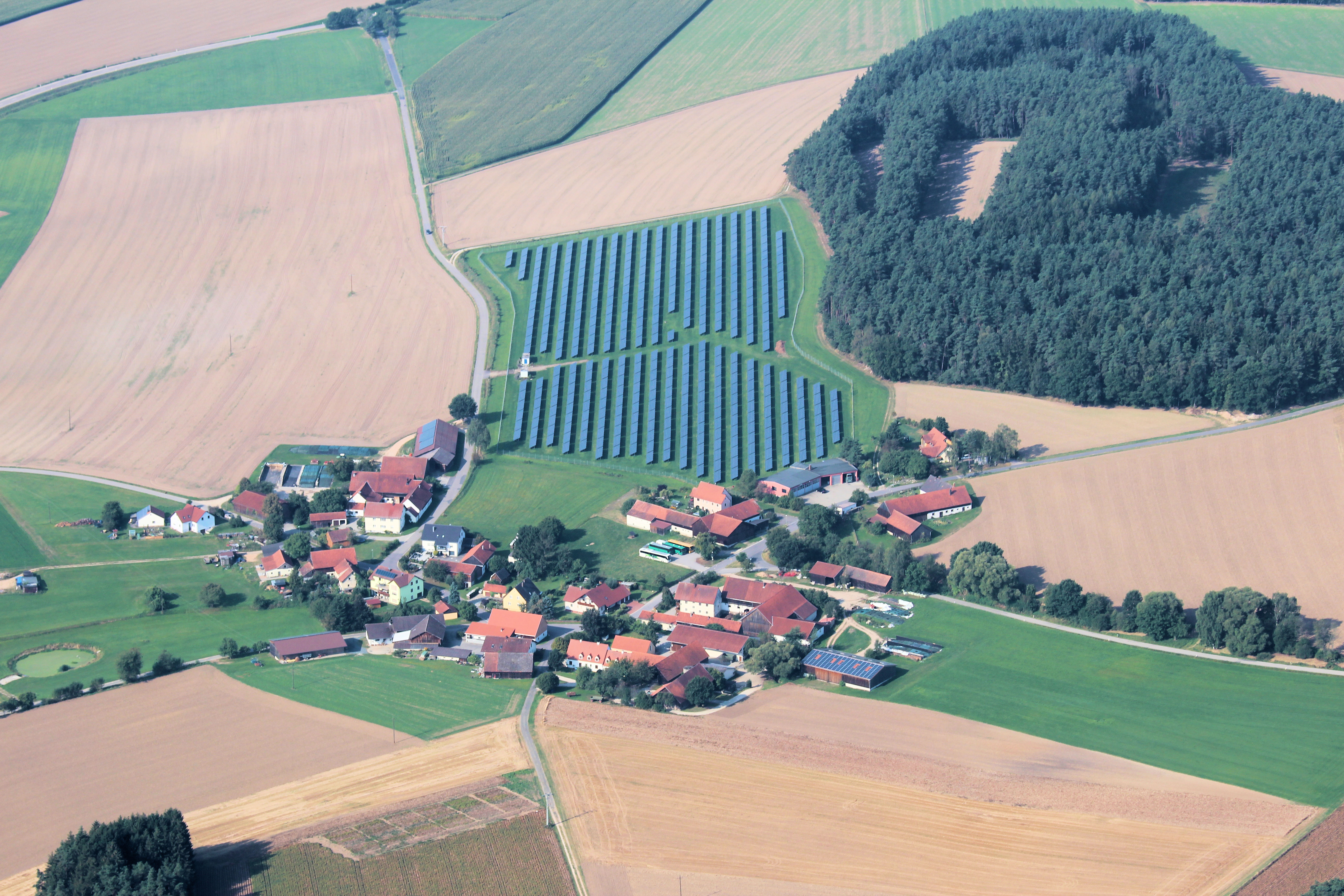 Eckendorf, Stadt Nabburg, Landkreis Schwandorf, Oberpfalz, Bayern